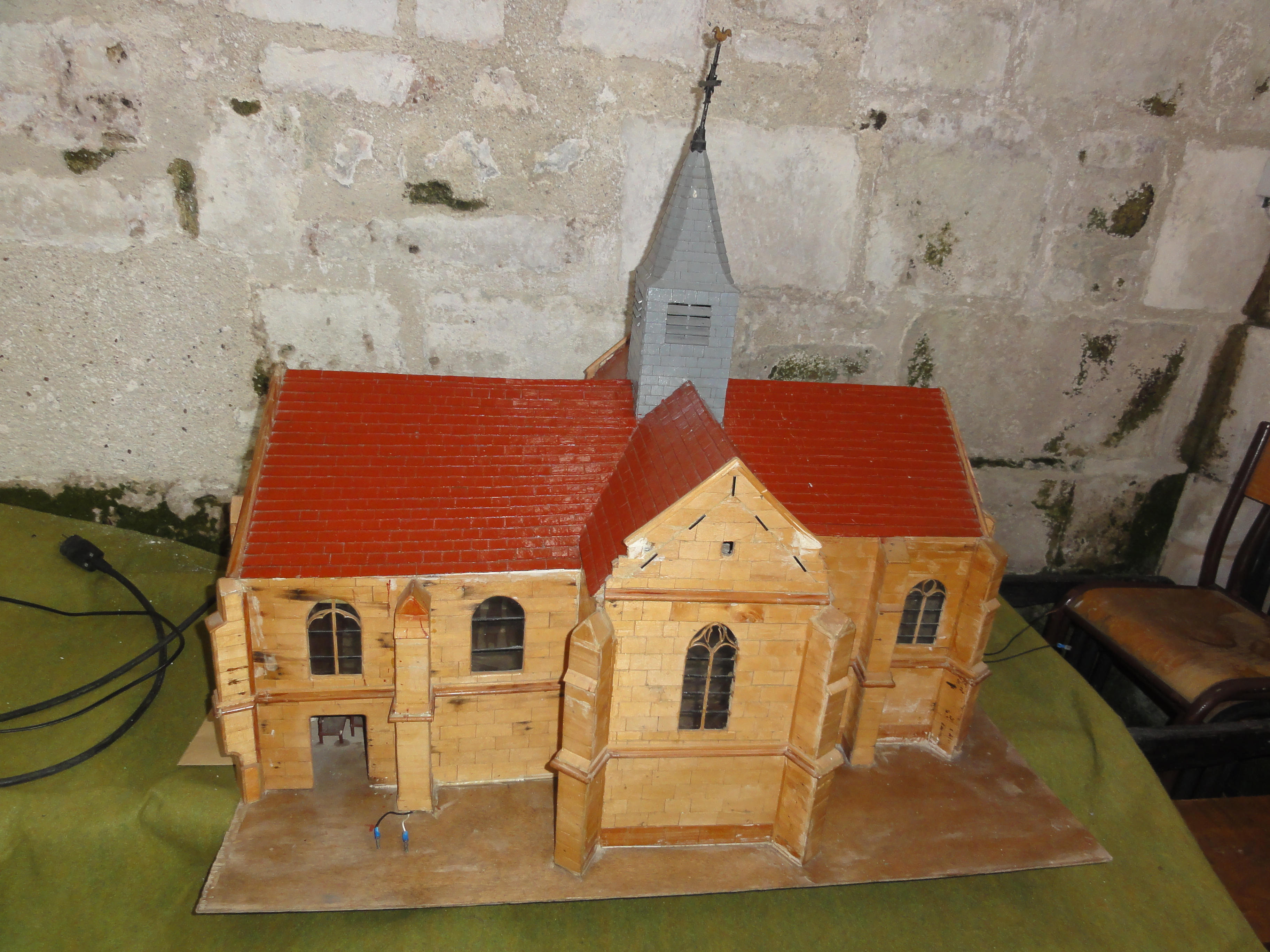 Armancourt (Oise) Église, modèle à petite échelle